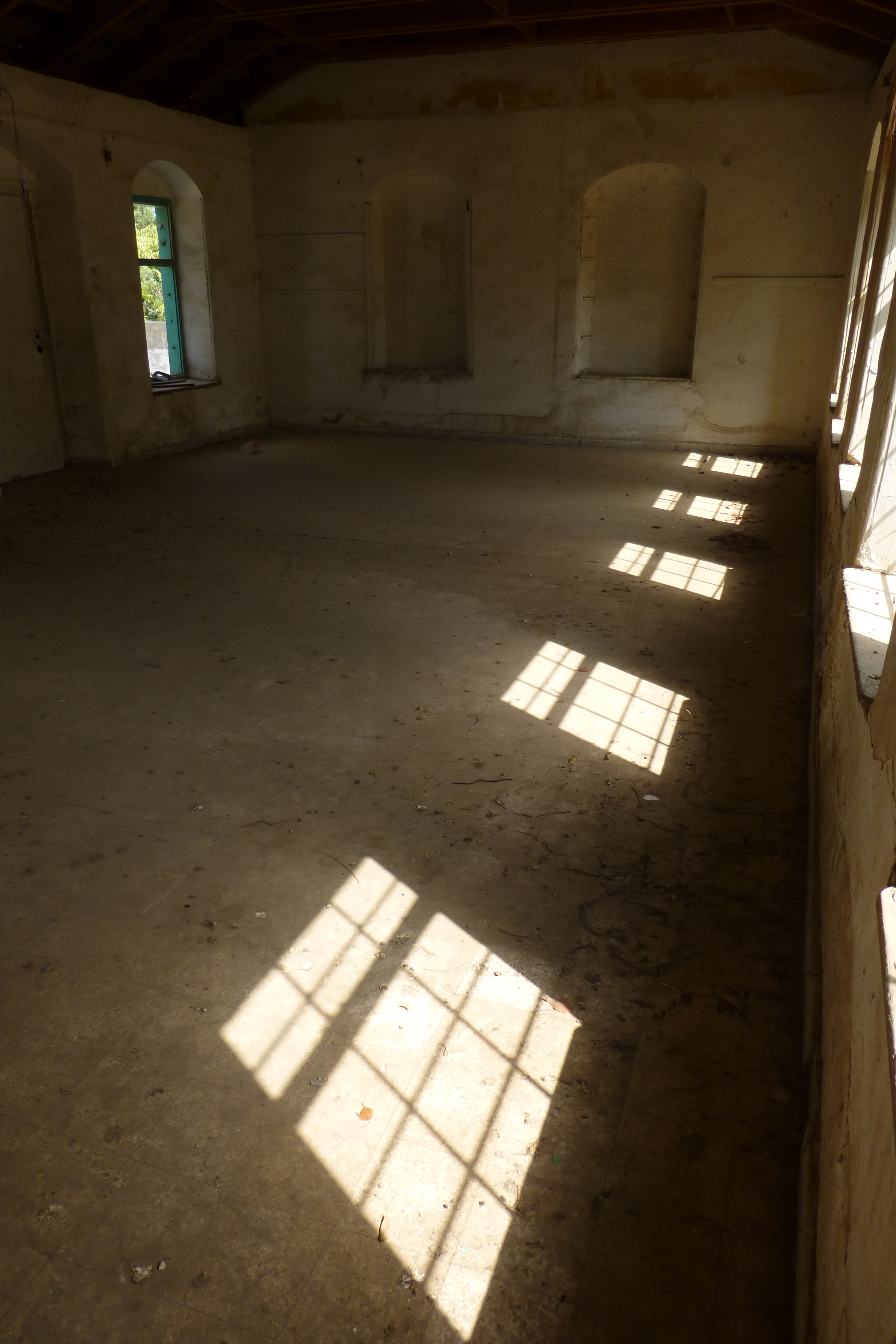 ביתם של מינה בנימין פוקס, מהבתים הראשונים במושבה. מבנה בן קומה שנבנה ב-1888 מאבני כורכר. ב-1970 עבר המבנה לידי "בני ברית" ושימש כמועדון לנוער וקשישים. מ-2004 עומד נטוש ומיועד לשימור כחלק ממתחם המוזיאון לתולדות גדרה.